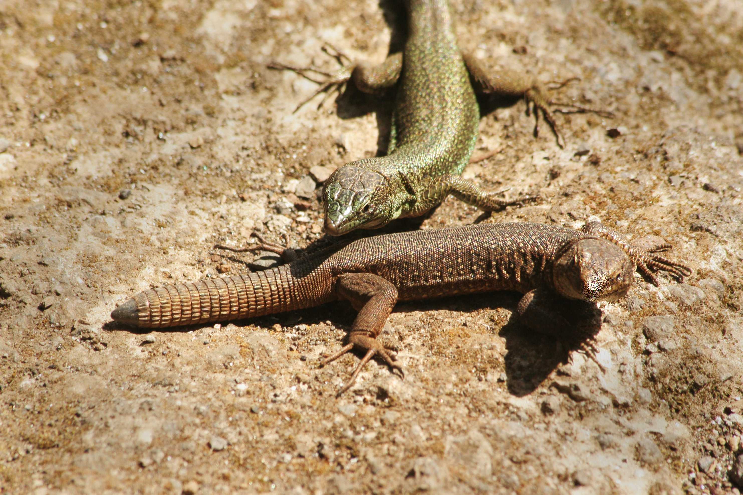 Madeira-Mauereidechsen (Teira dugesii), Madeira, Portugal, Levada do Norte in der Nähe des Encumeada-Passes